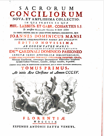 Sacrorum conciliorum nova, et amplissima collectio, Святых соборов новое и обширнейшее собрание — собрание документов на древнегреческом и латинских языках: актов поместных, Вселенских соборов, а также посланий императоров и иерархов, к ним относящиеся, начиная с I века.